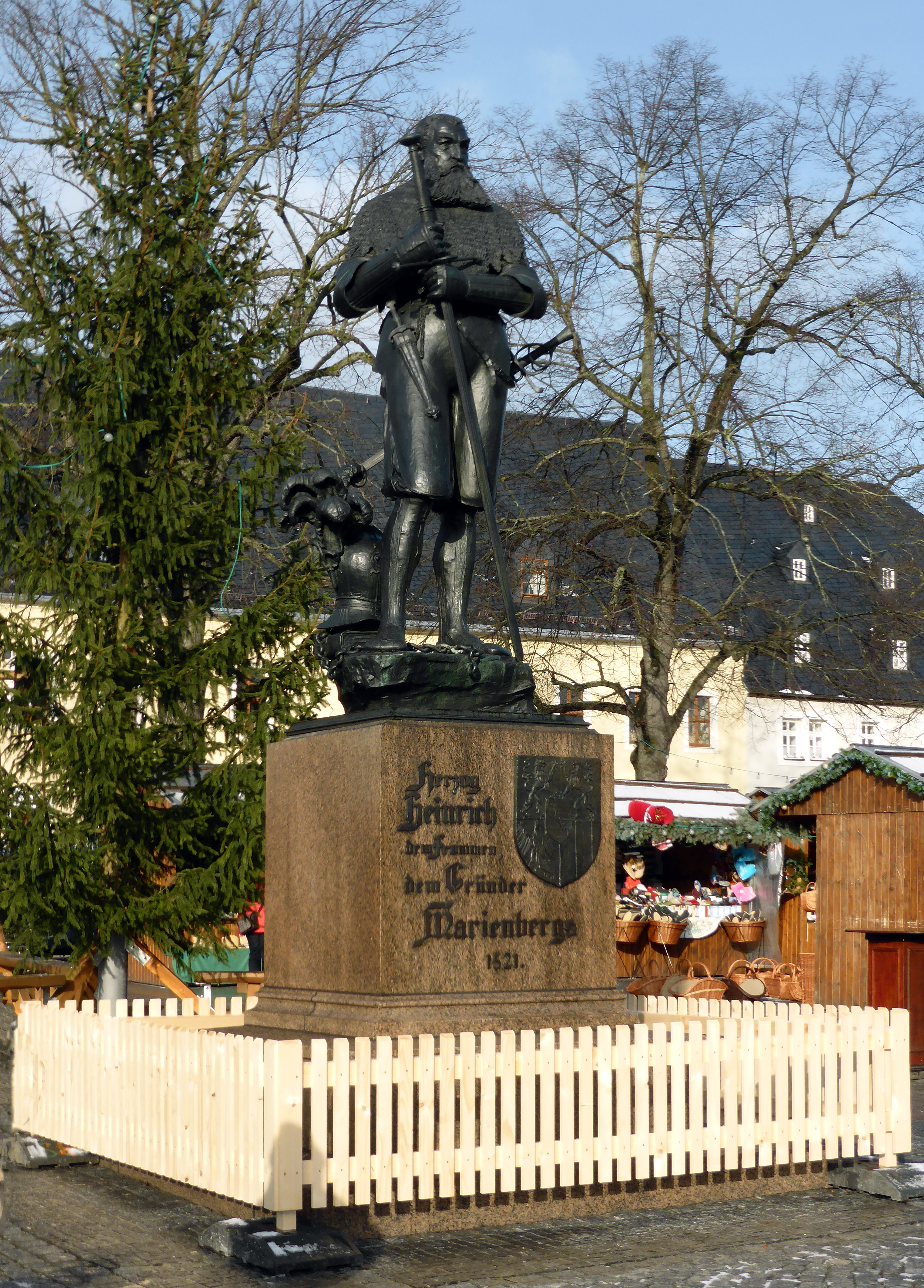 Denkmal Herzog Heinrich der Fromme, Gründer Marienbergs 1521 - (Marktplatz Marienberg).